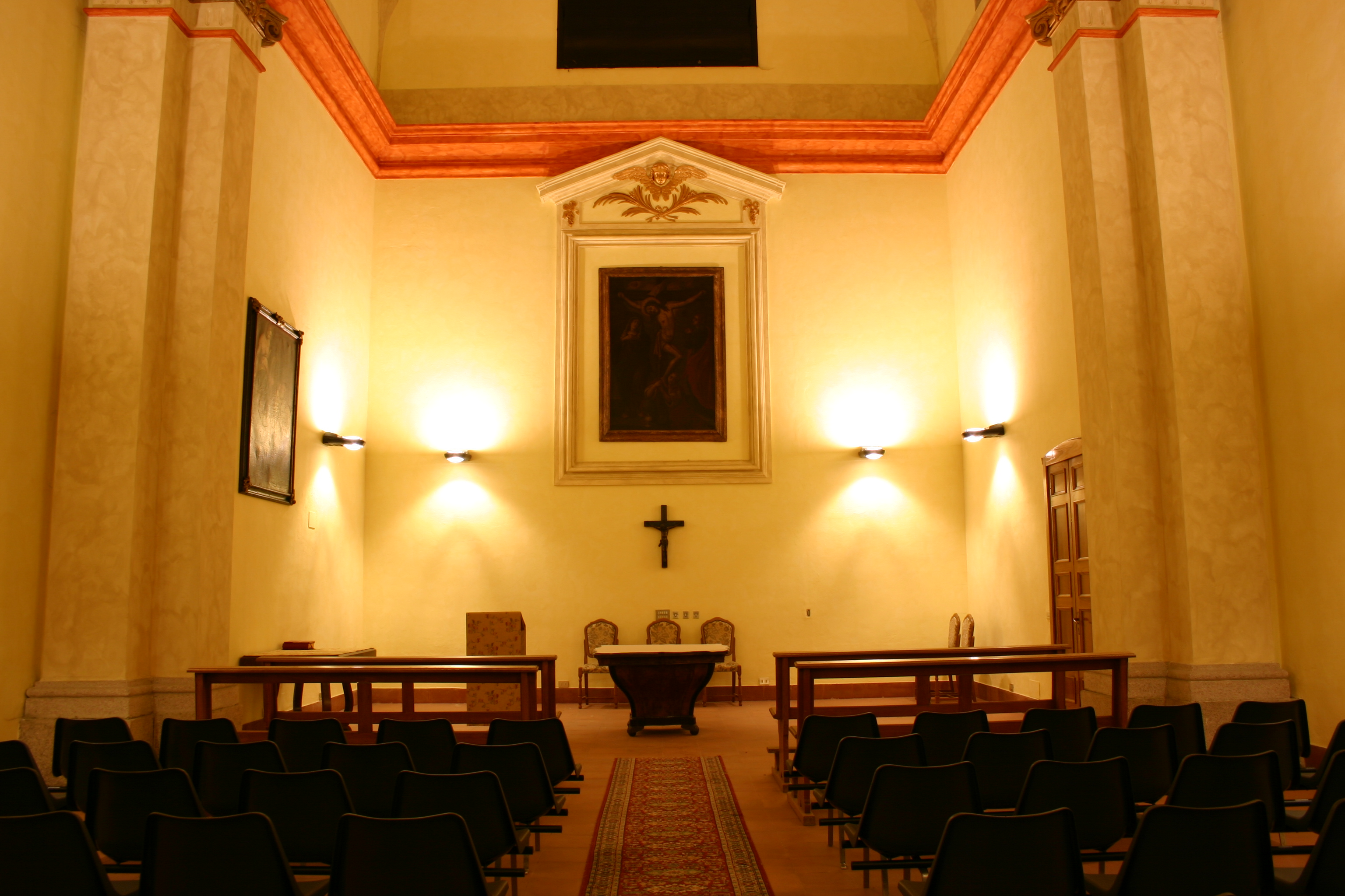 la cappella del collegio cairoli, opera di Leopoldo Pollack